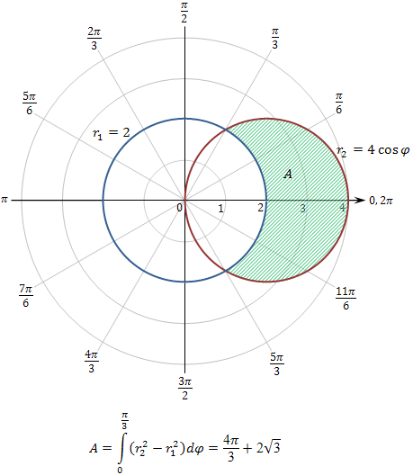 Площадь между двумя окружностями